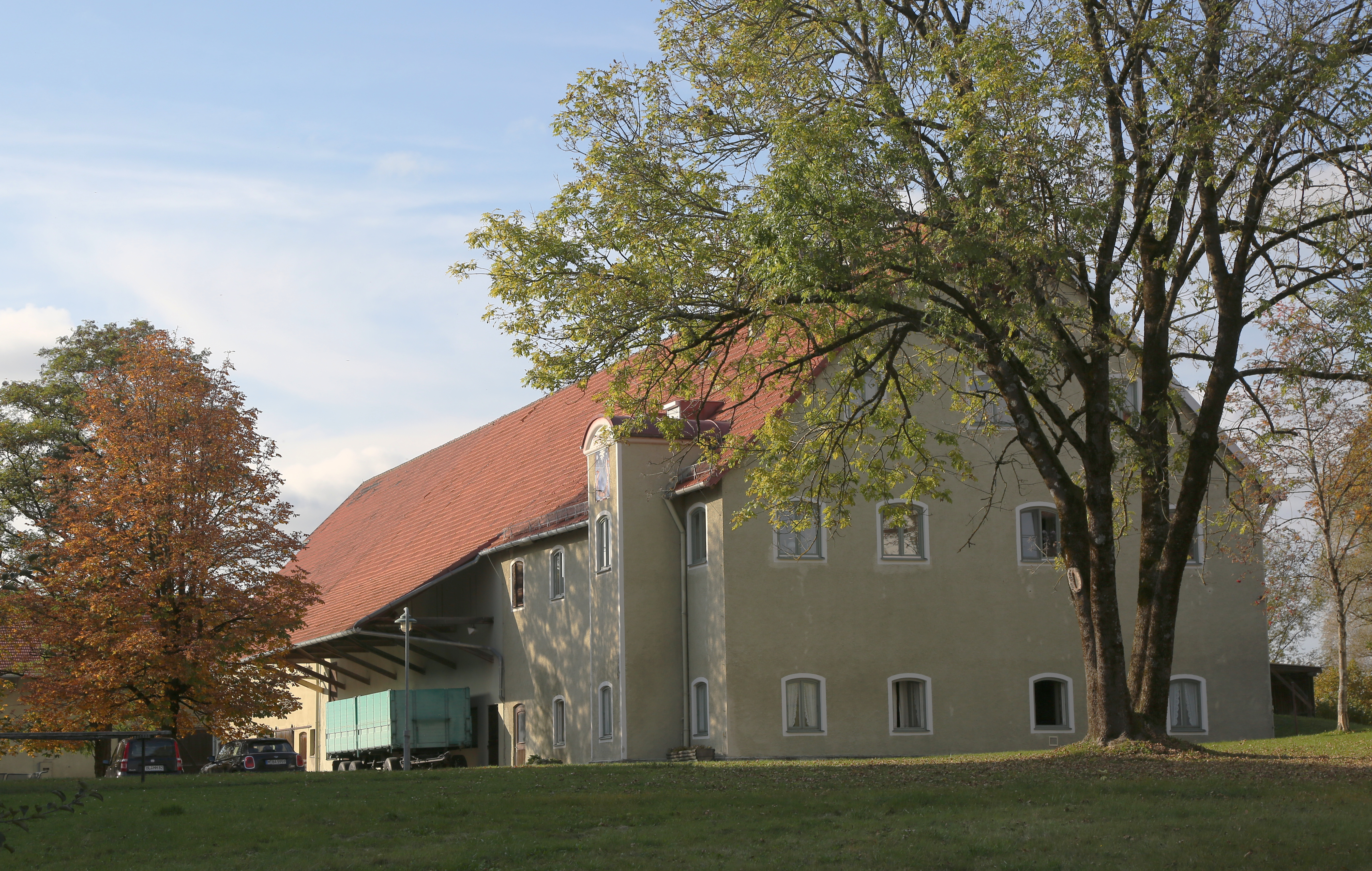 Gut Warnberg in München-Solln. Auf den Gelände eines historischen Gutes befinden sich die Marienanstalt Warnberg, die Privatschule Gut Warnberg, ein Reitstall und weitere Gebäude. Gutshaus, zweigeschossiger Schopfwalmdachbau mit Erker, im Kern wohl Ende 17. Jh. Blick von Norden